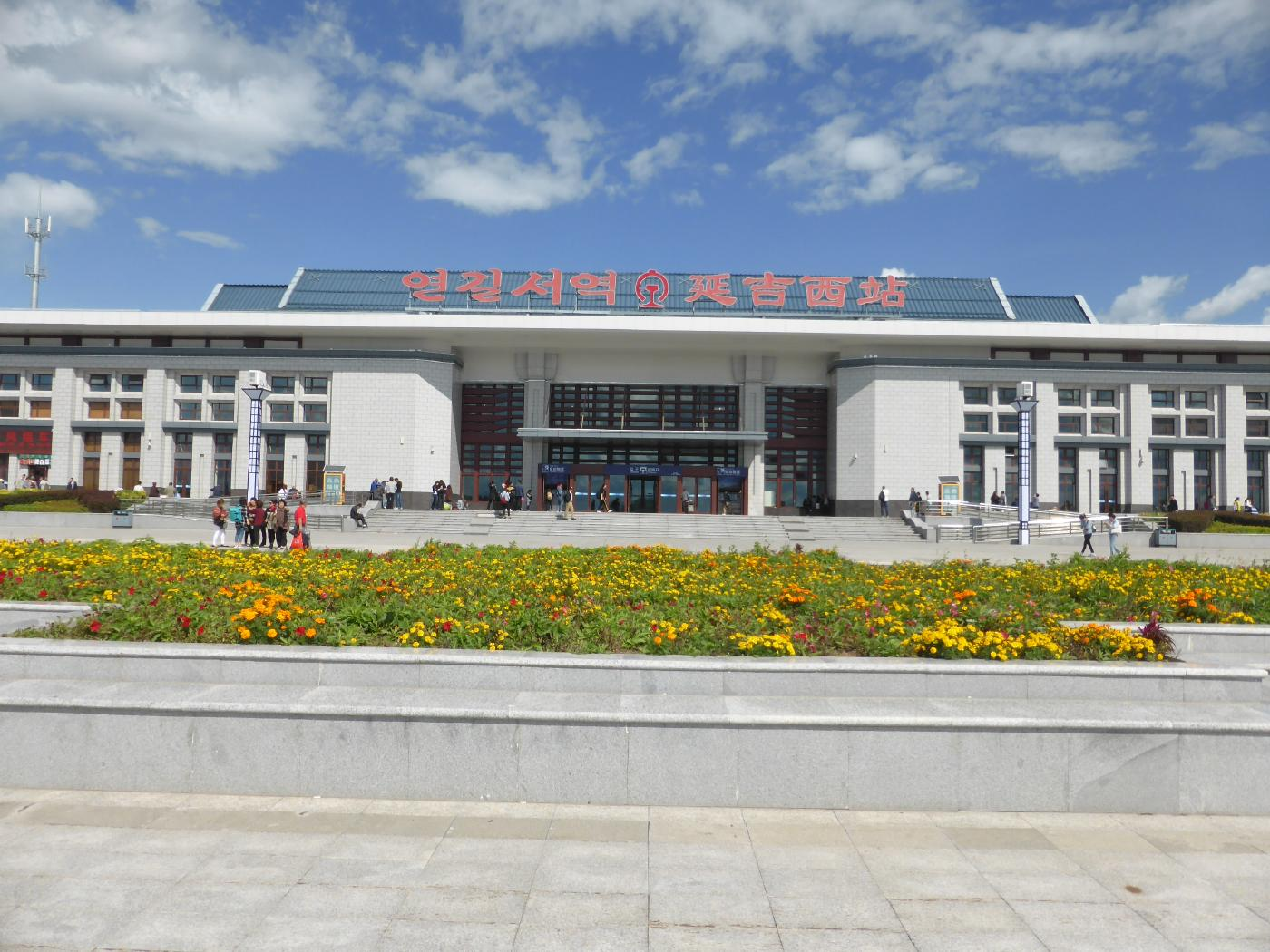 延吉西駅全景